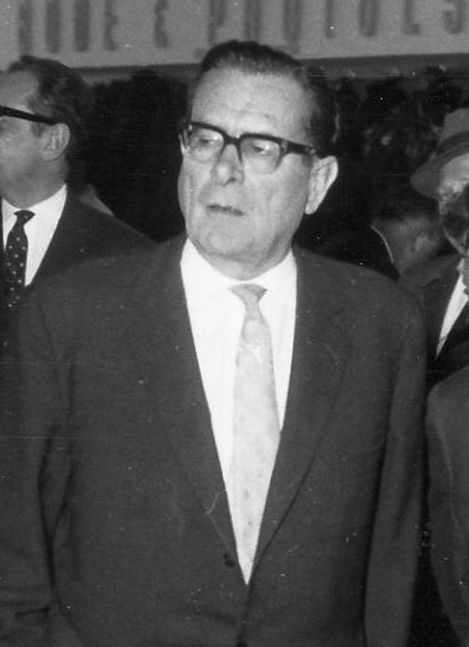 Dr. Werner Bockelmann, Oberbürgermeister von Frankfurt am Main, 1963. Anlässlich der Eröffnung der Internationalen Pelz-Messe 1963